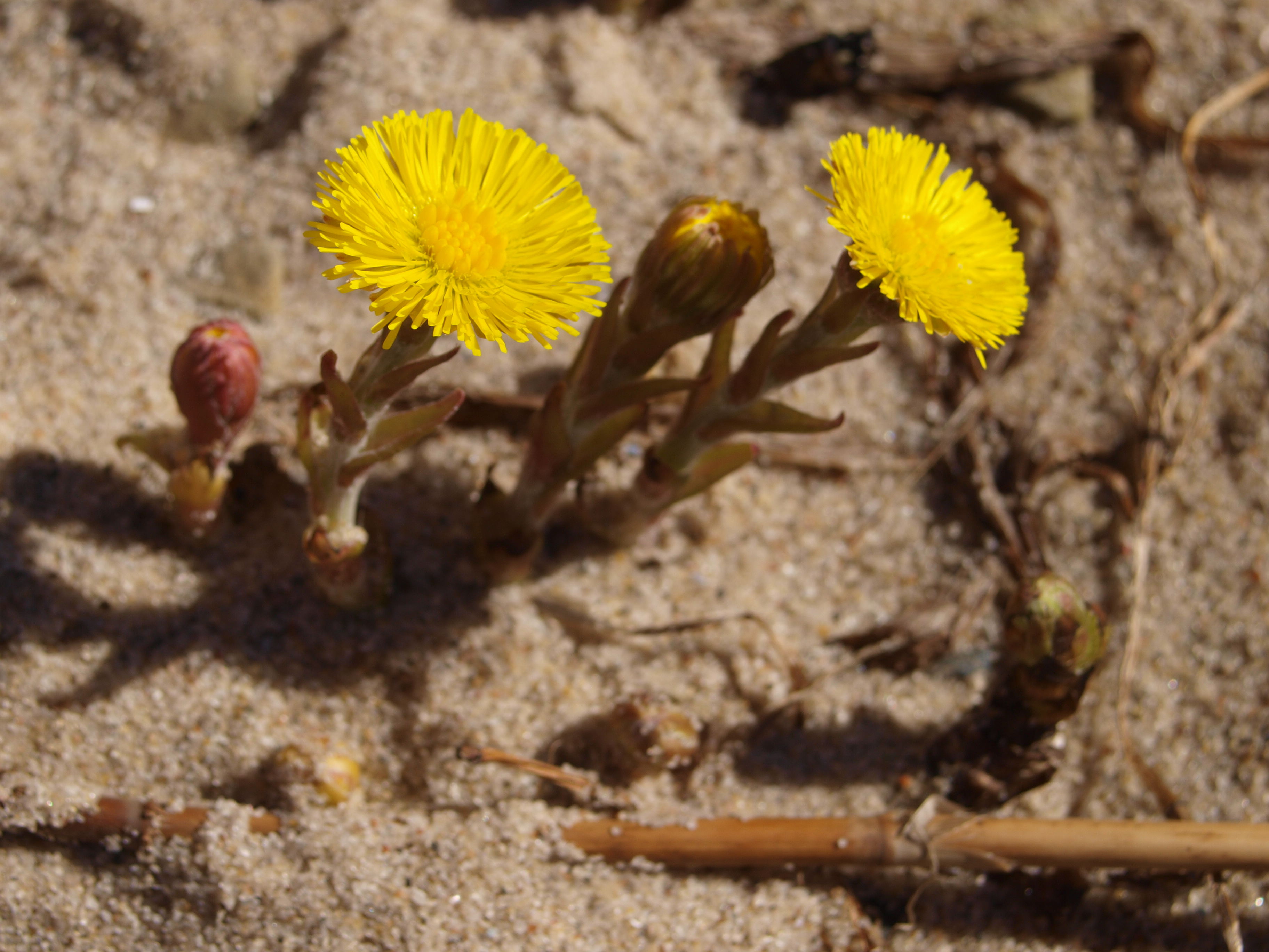 Paiseleht